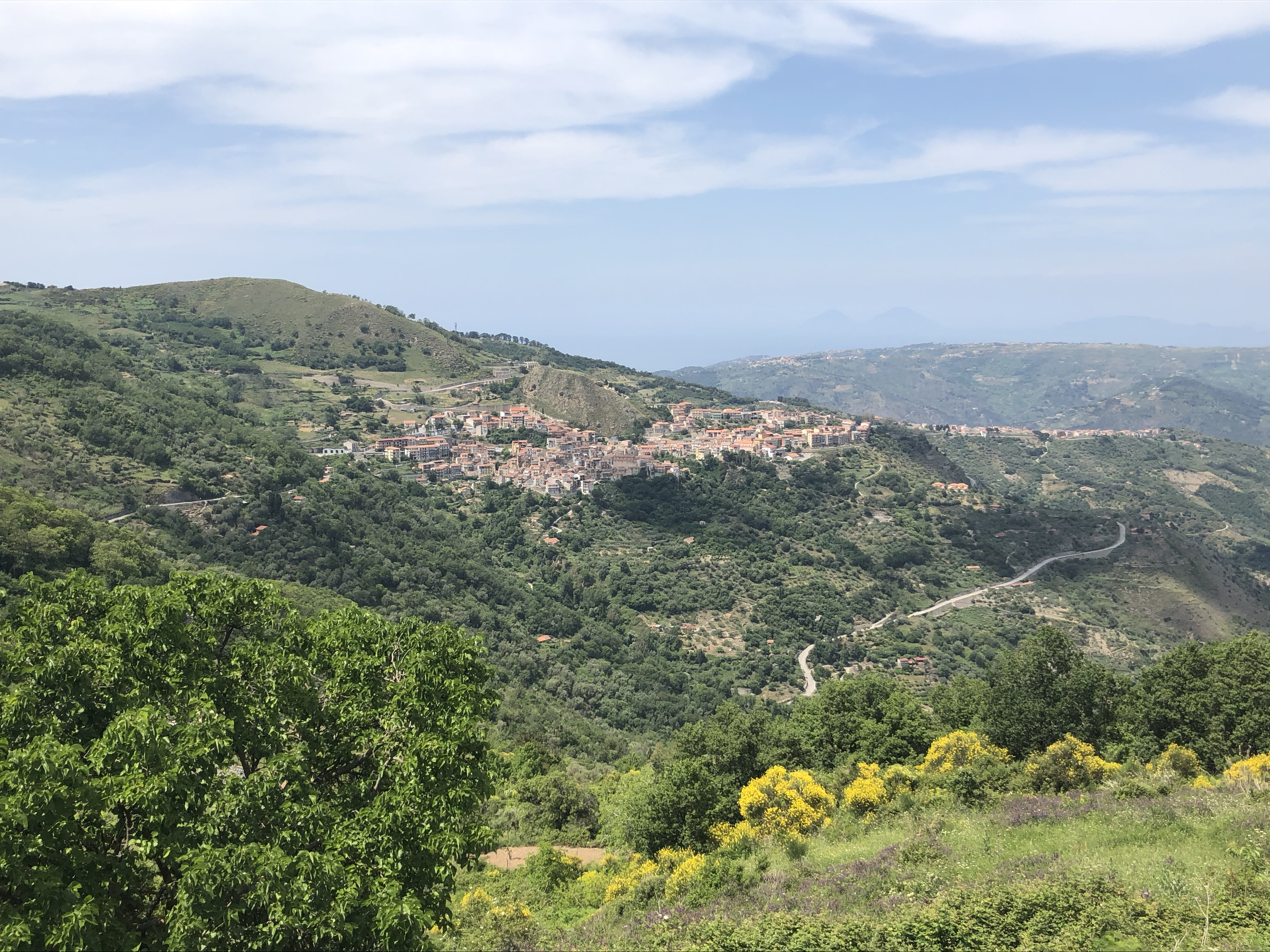 Frazzanò dal Convento di San Filippo di Fragalà